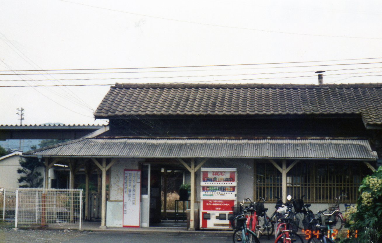 1994年のJR香椎線須恵駅